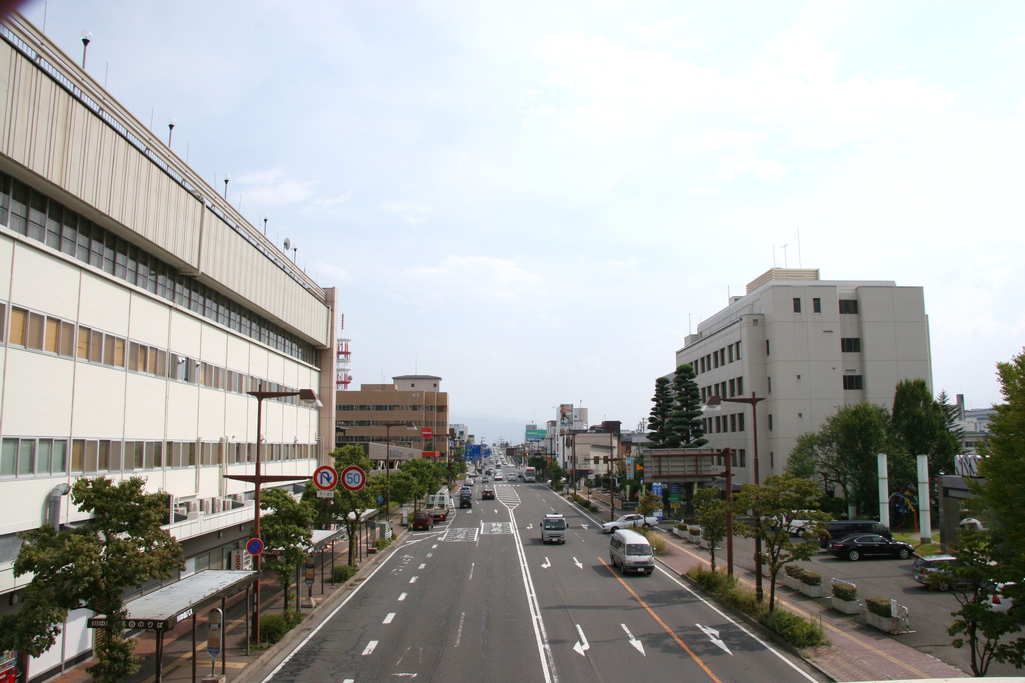 長野県庁通り（国道19号線）